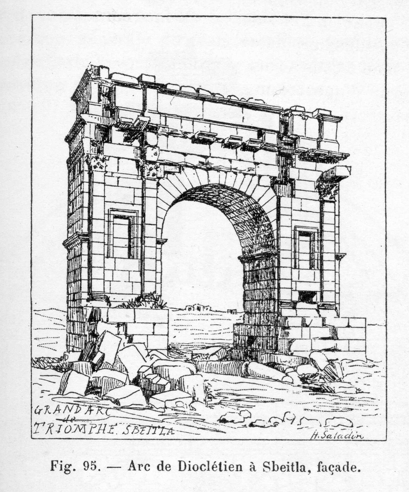 Arc de triomphe de Sbeitla vu par Henri Saladin